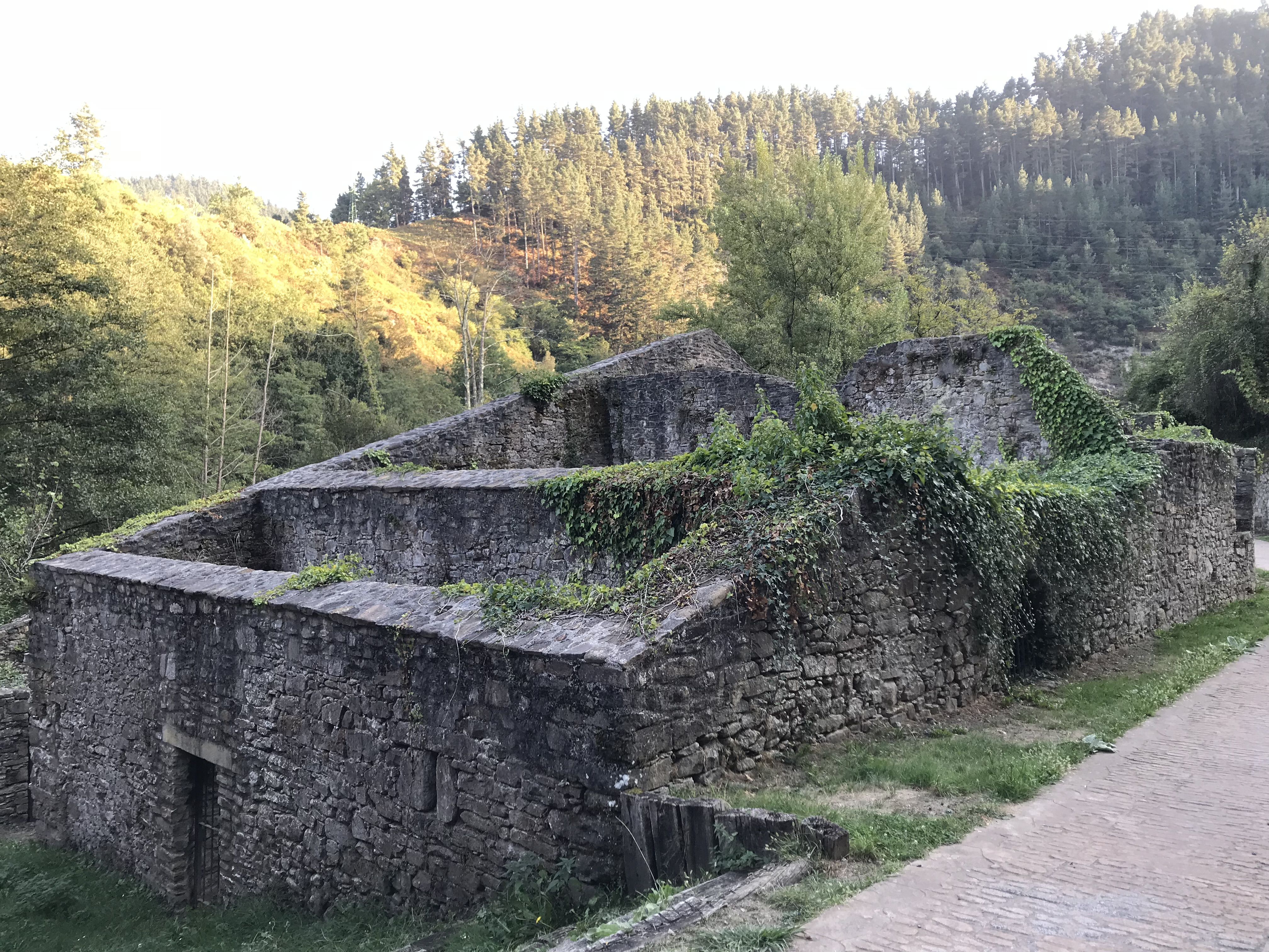 Bolunburu burdinola